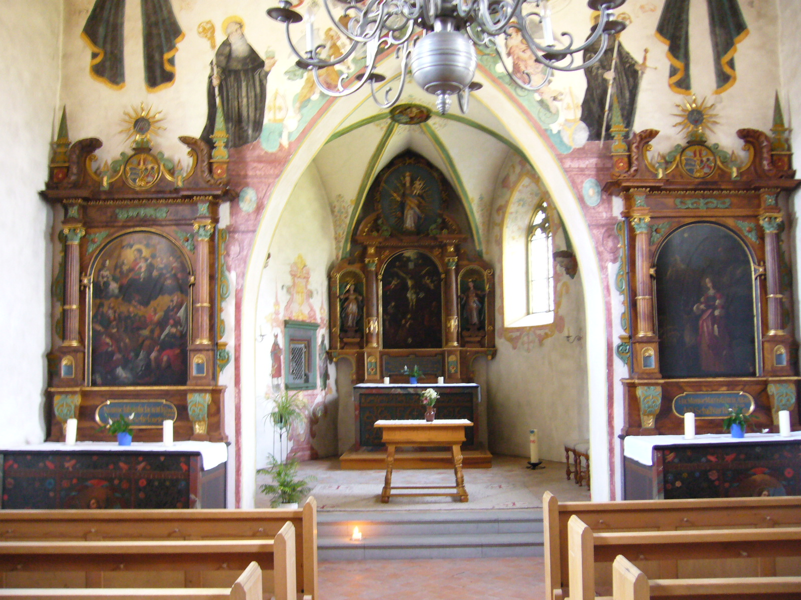 Kapelle St. Margareten, Münchwilen, Kanton Thurgau. Fotografiert von Peter Berger, 23. Juli 2003.